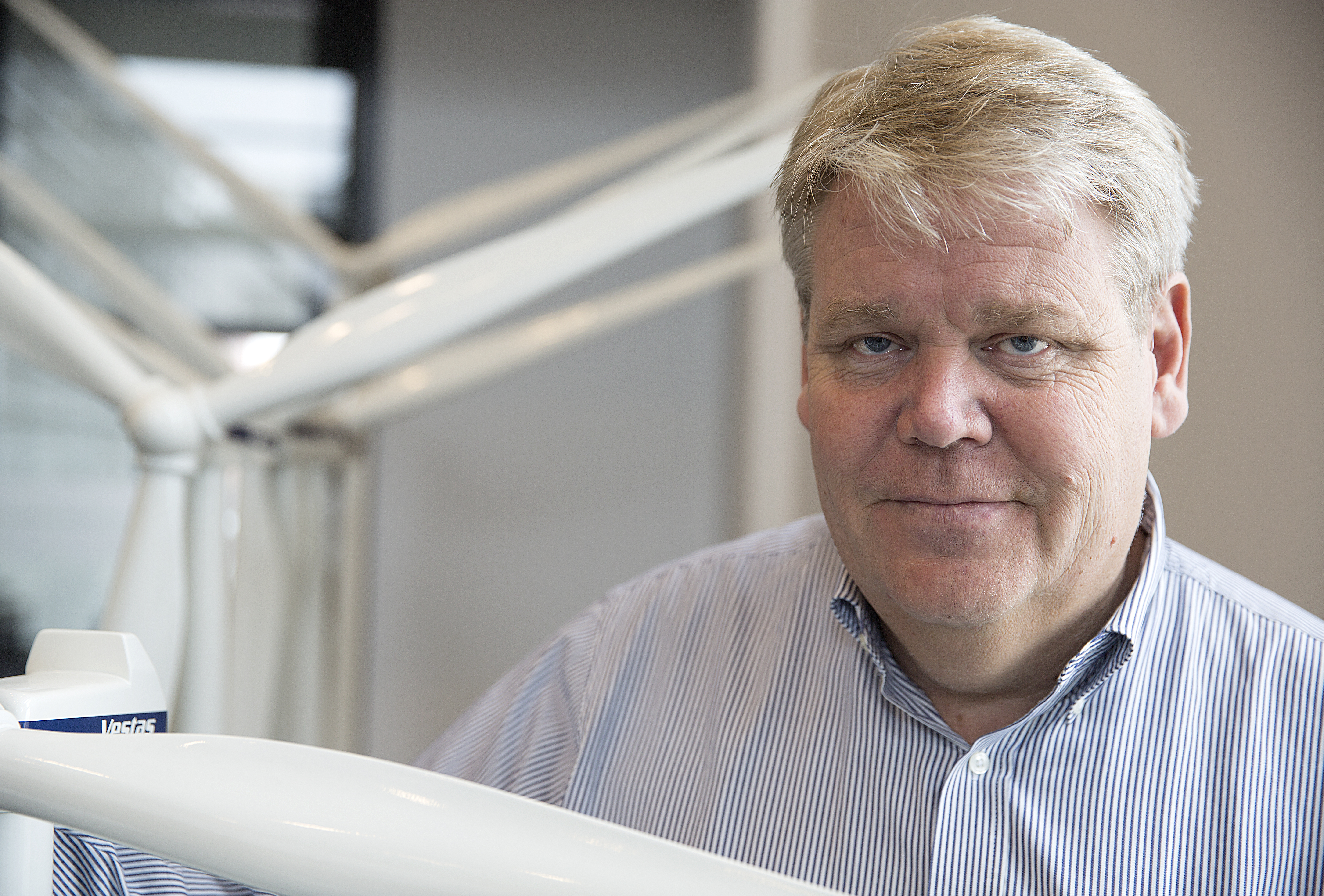 Bert Nordberg, styrelseordförande i danska vindkraftsföretaget Vestas, fotograferad vid deras kontor i Malmö 20130415. Han är även styrelseledamot i svenska skogskoncernen SCA samt i kanadensiska mobiltillverkaren Blackberry som har stor utvecklingsavdelning i Malmö. Bert Nordberg har tidigare varit vd för Sony Ericsson.